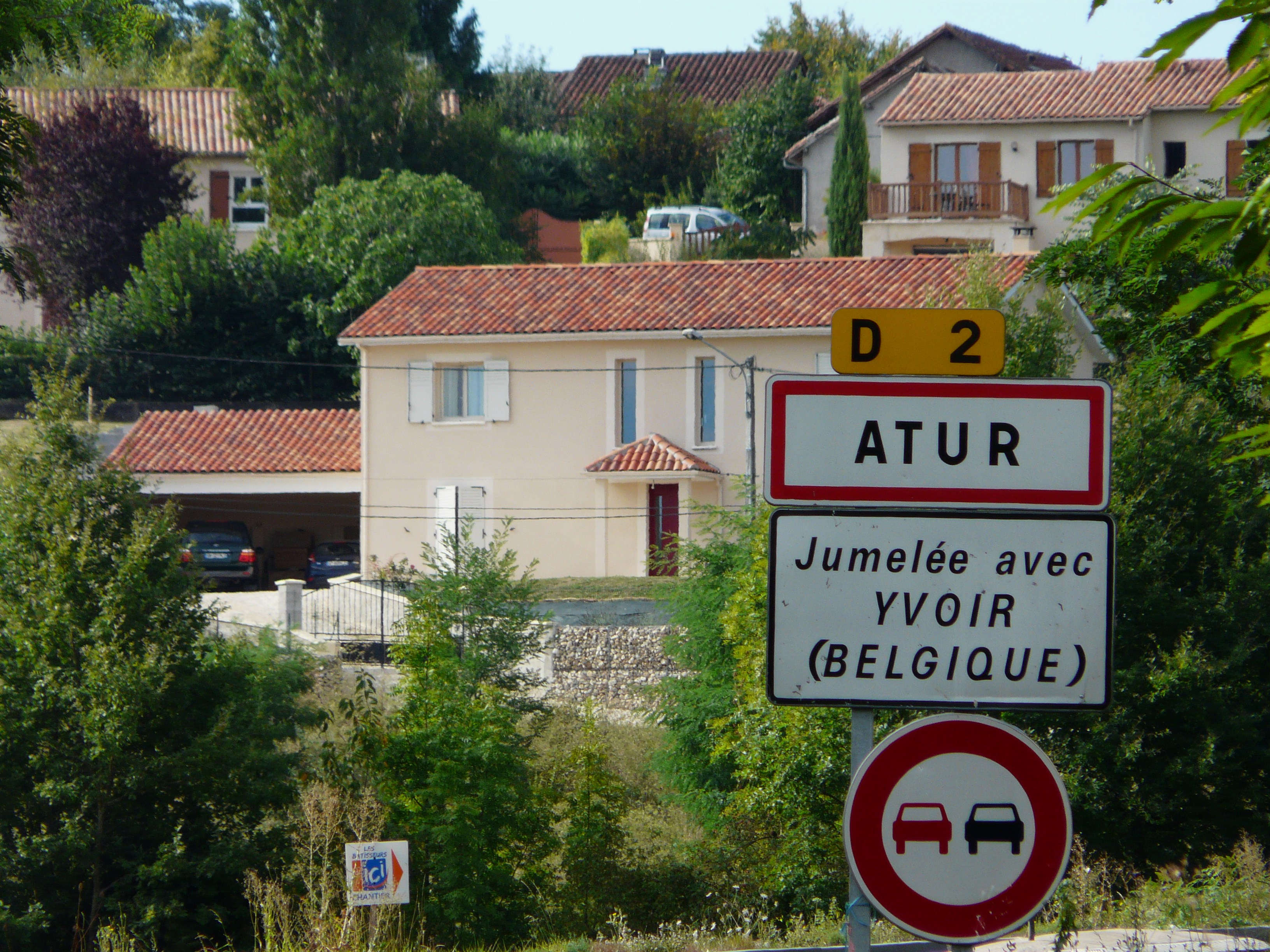 Panneau de jumelage d'Atur, Dordogne, France.